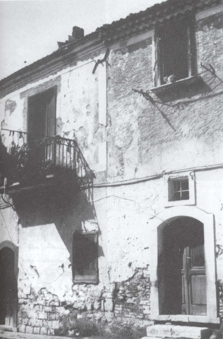 Casa del brigante Carmine Crocco